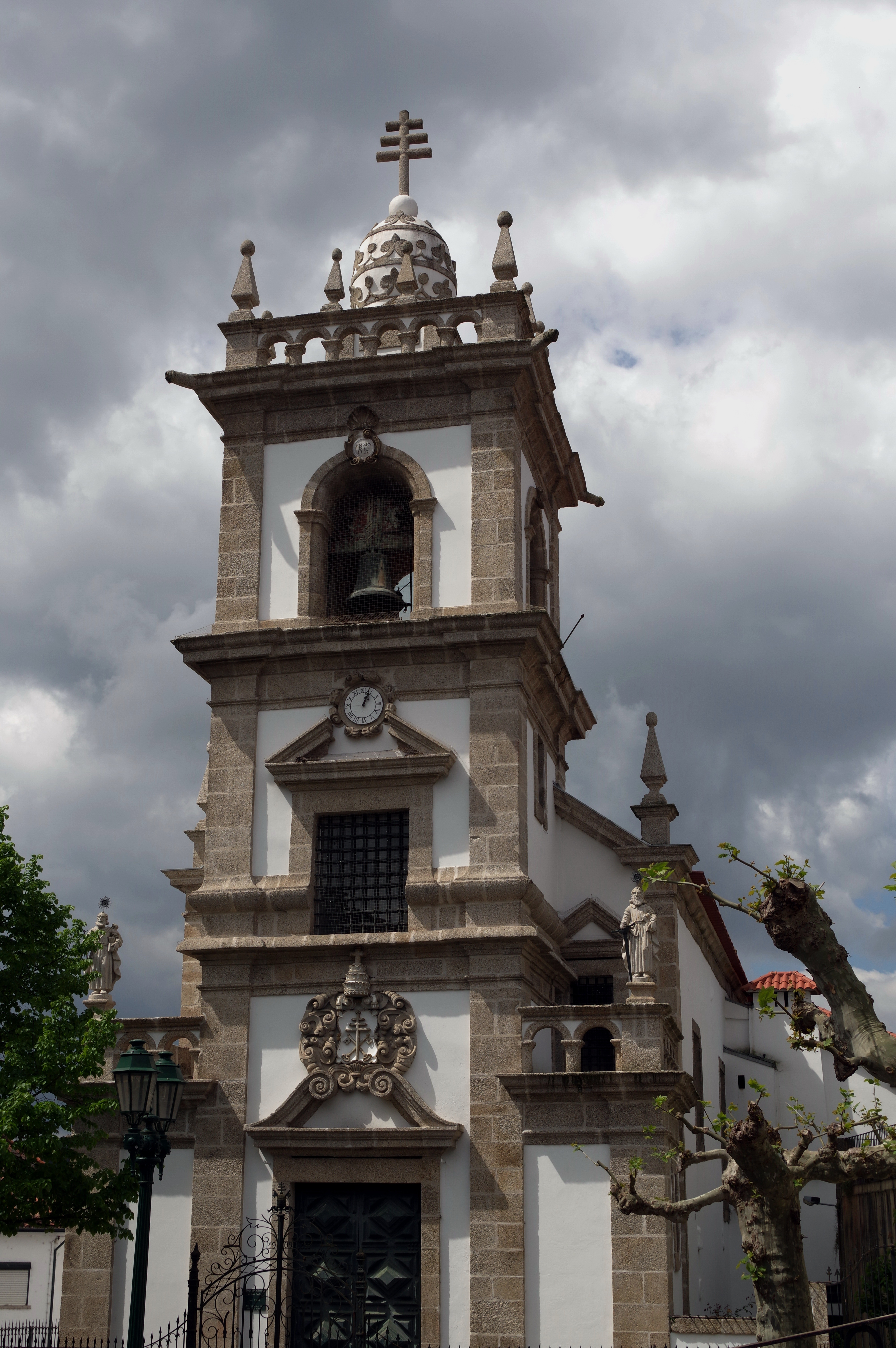 22.4.14 Amarante 45